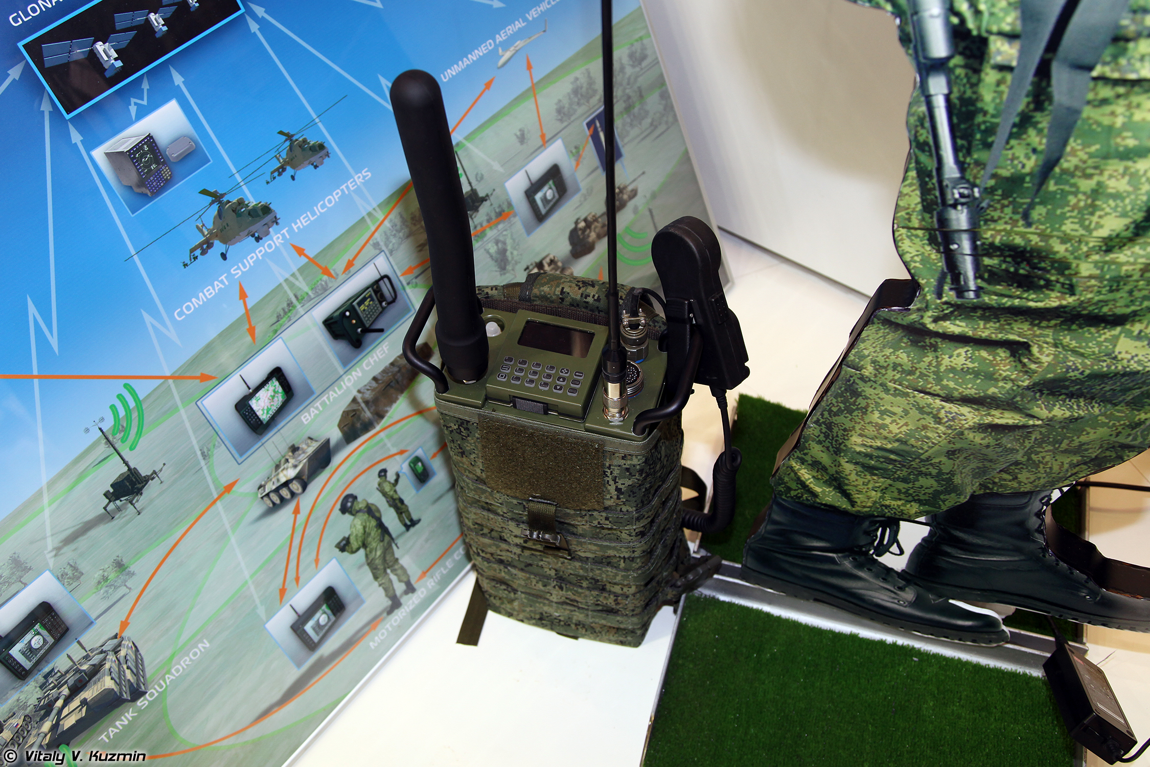 Возимый вариант радиостанции Буссоль (Bussol' radiostation onboard variant)